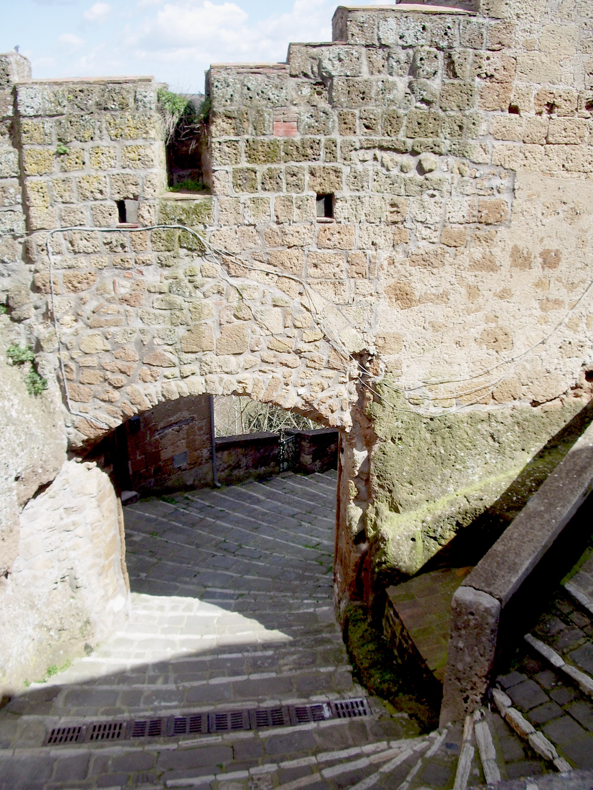 La Porta di Sovana lungo le Mura di Pitigliano